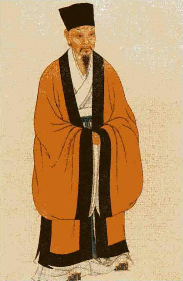 苏东坡像